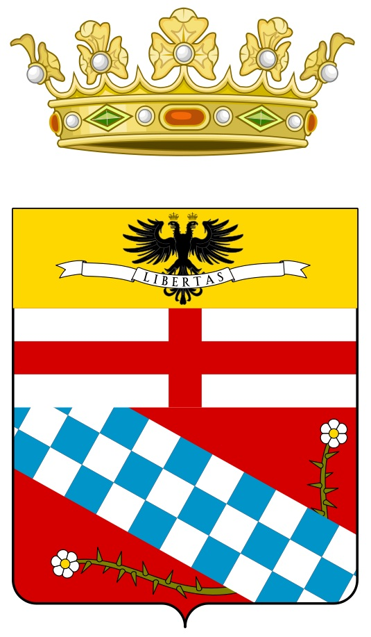 Stemma della casata dei Cybo-Malaspina